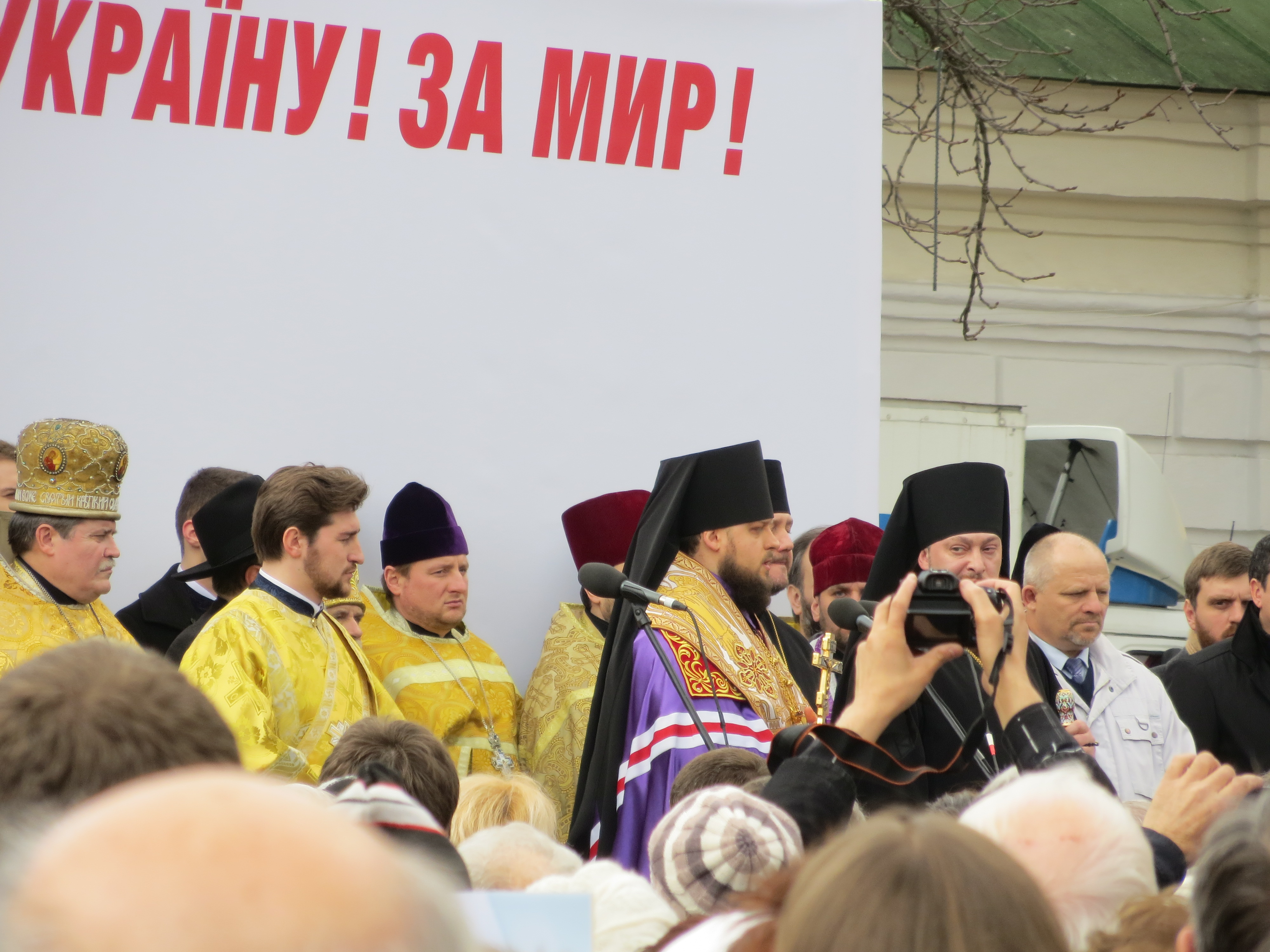 Міжконфесійний молебень «За Надію! За Україну! За мир!» 01 березня 2015 року, Київ